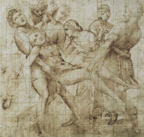 Studio per il gruppo centrale della Deposizione Penna e inchiostro bruno, tracce di matita nera, carta bianca, 289 x 298 mm Firenze, Gallerie degli Uffizi, Gabinetto Disegni e Stampe, inv. 538E